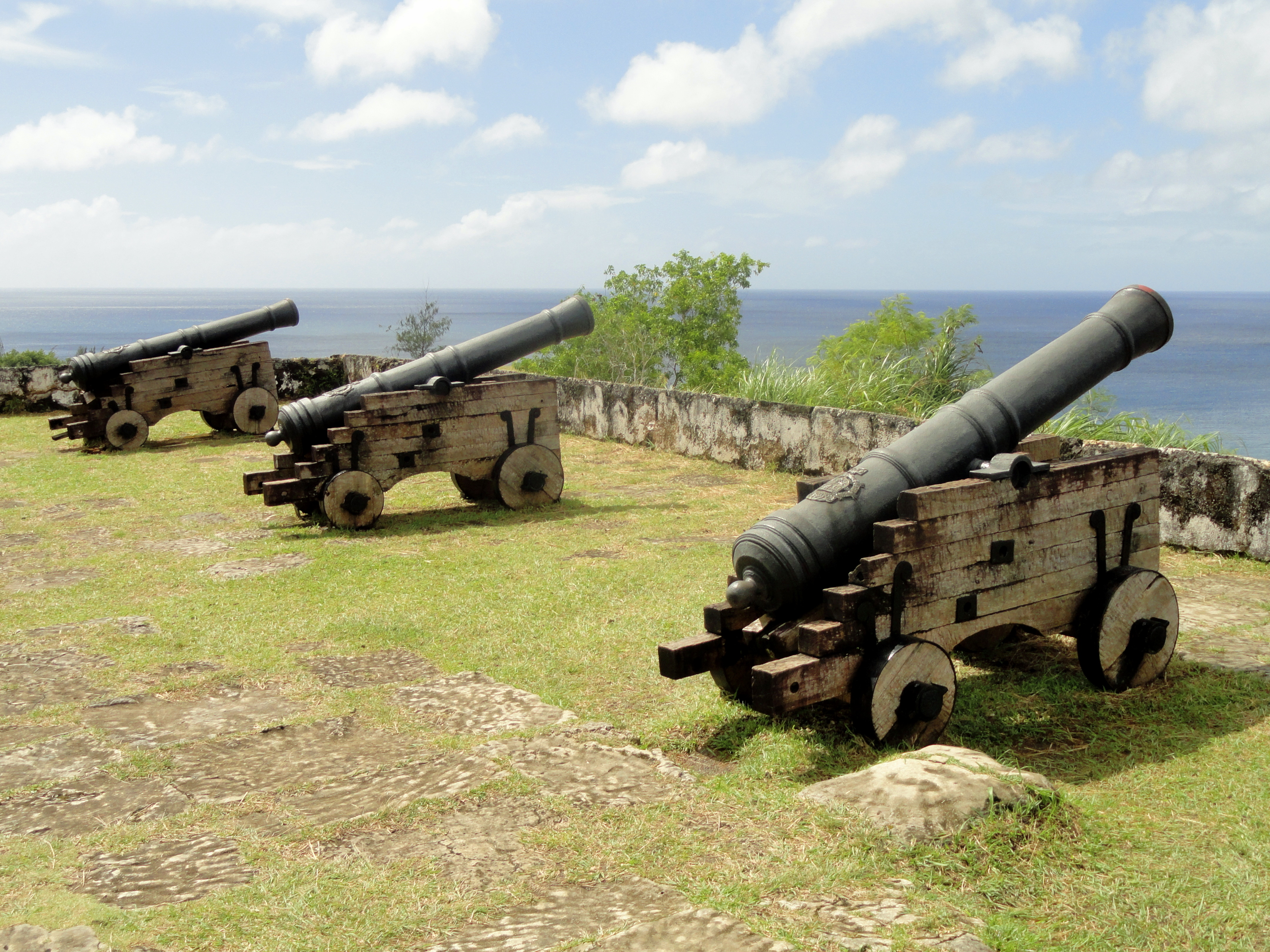 Fort Nuestra Señora de la Soledåd, Umatac, Guam, USA.